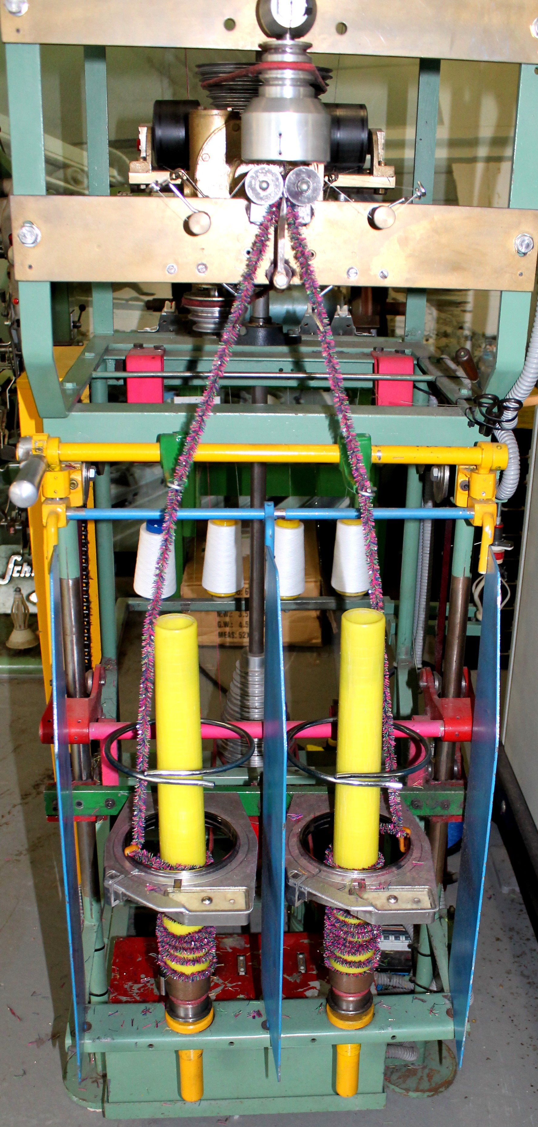 Zwirnkopf einer Chenillemaschine